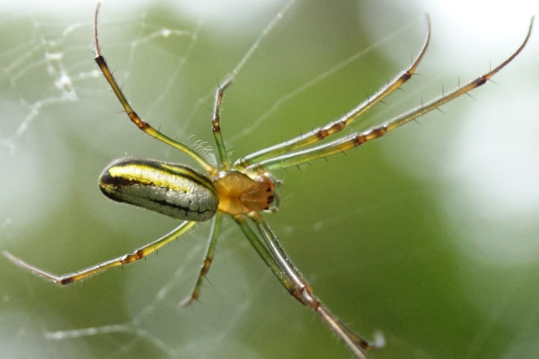 コシロカネグモ 日本東海地方